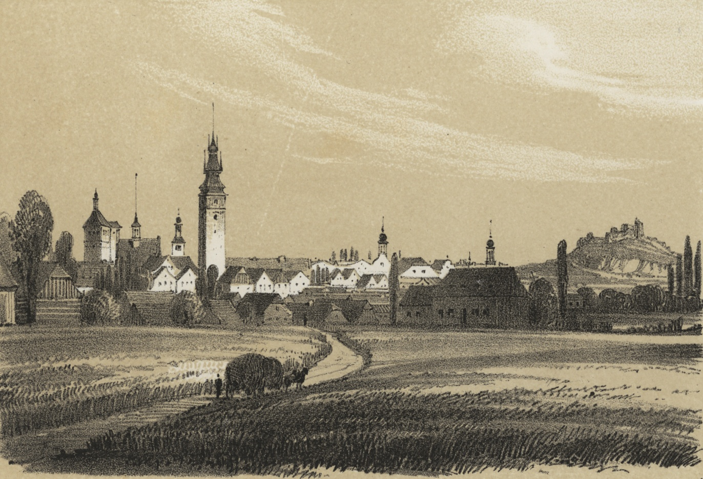 Parduice